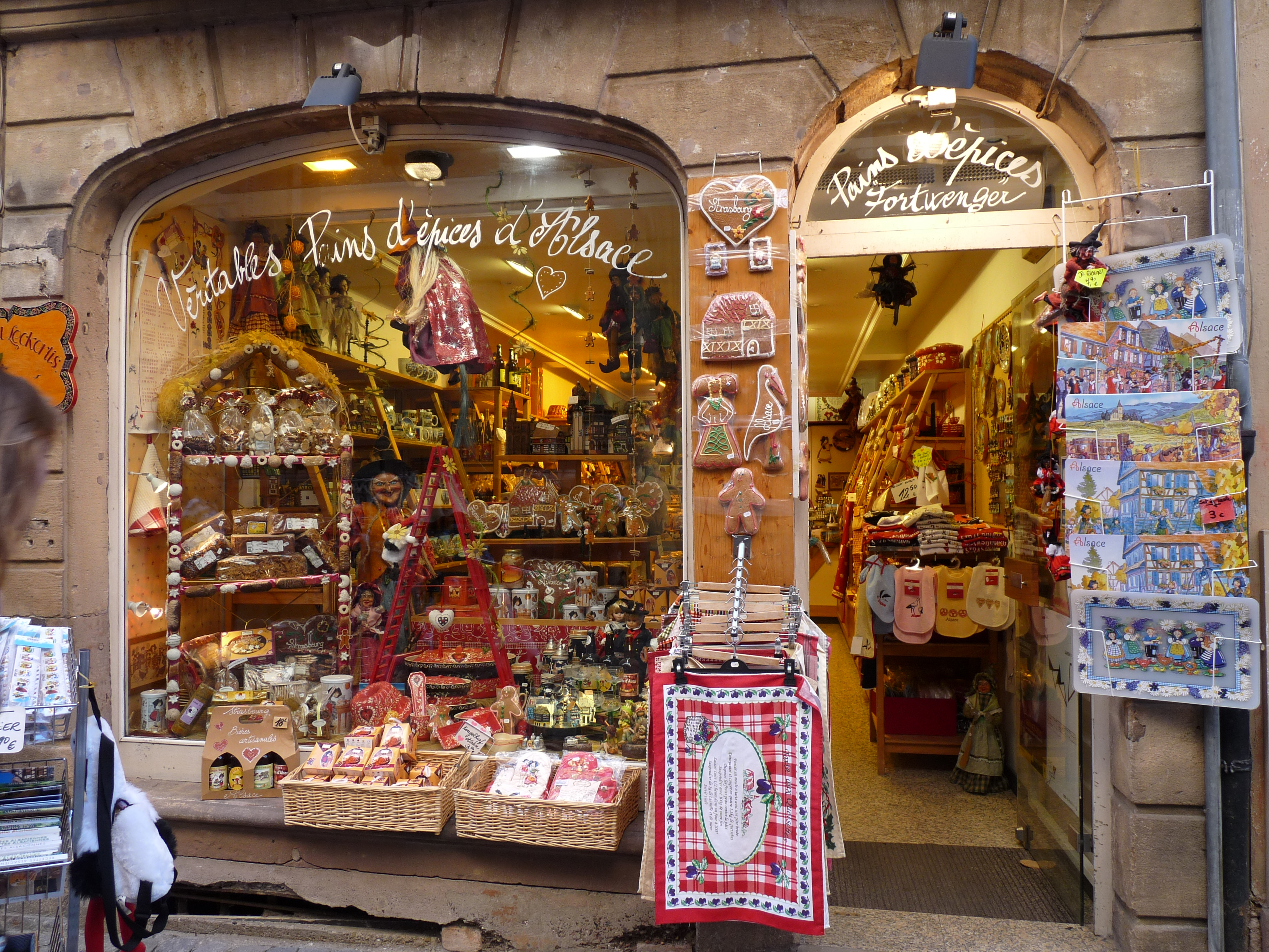 Magasin de pains d'épices à Strasbourg (rue du Maroquin, près de la cathédrale)